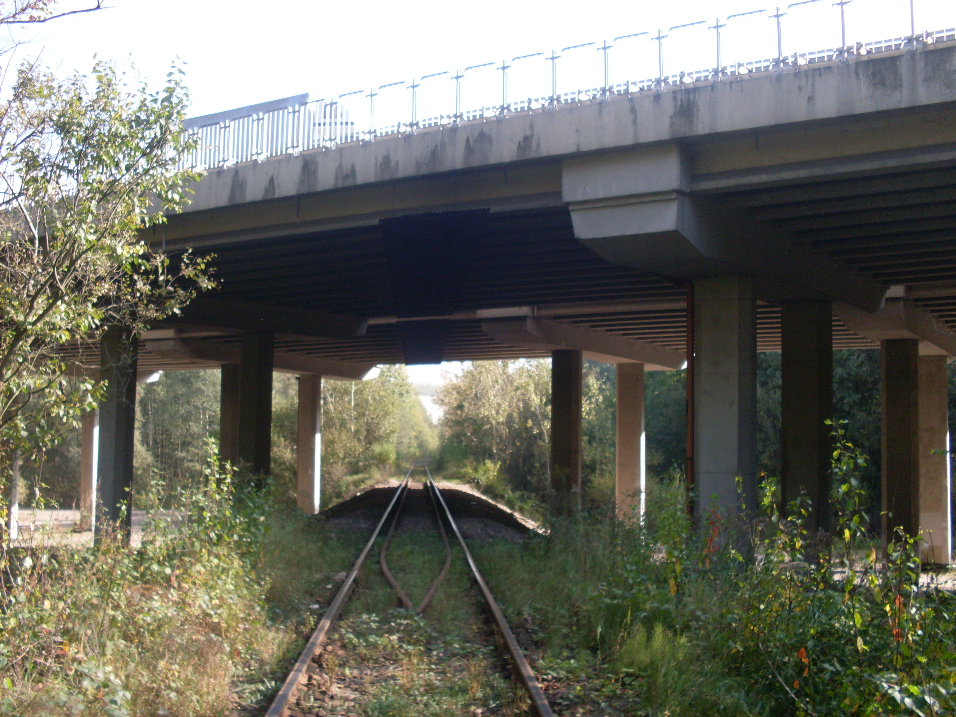 214,4 m wiadukt kolejowo-drogowy pod autostradą A4 na północ od przysiółka Tataruchy miejscowości Zalas w woj. małopolskim